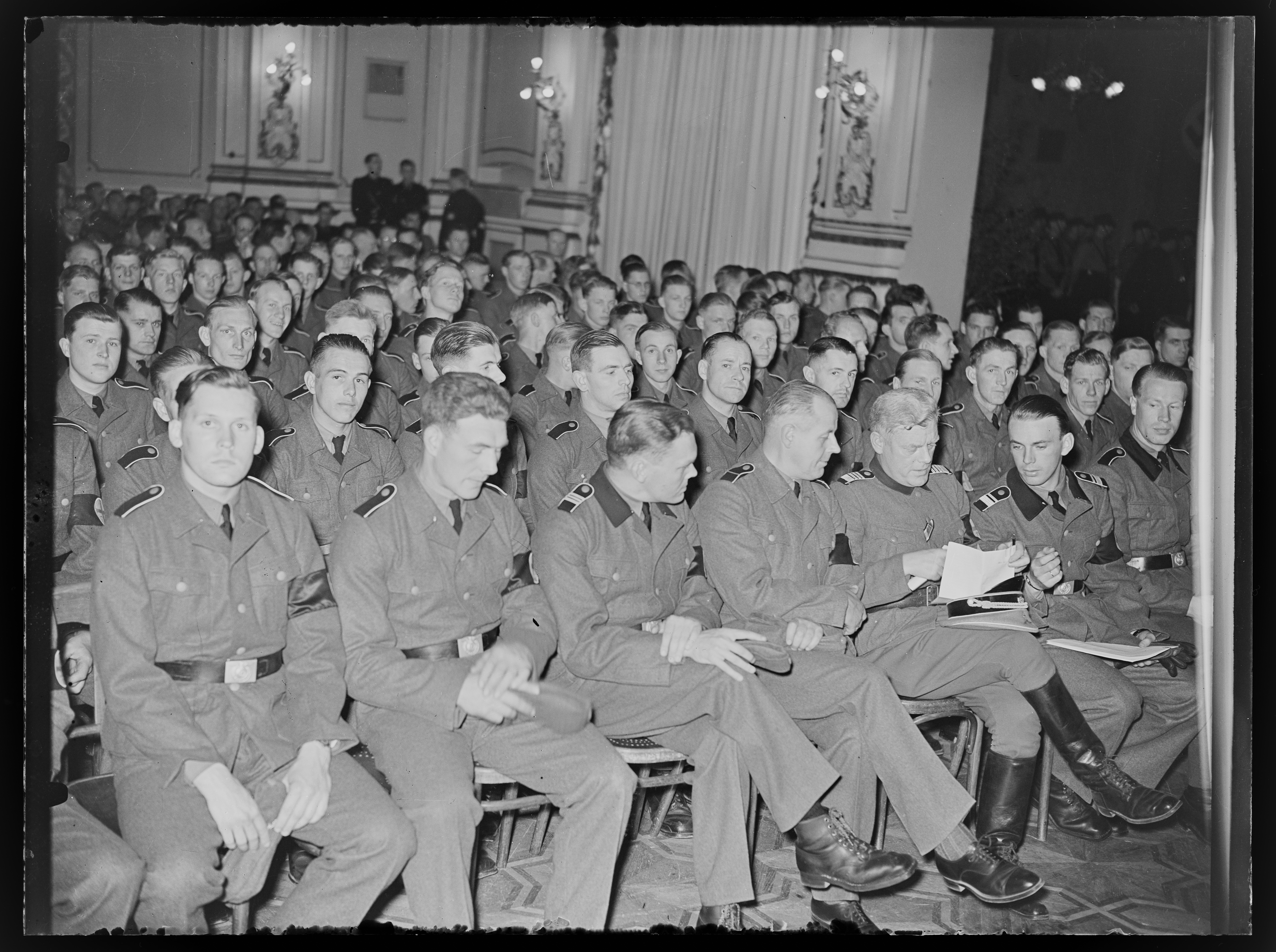 Norges SS. Edsavleggelsen